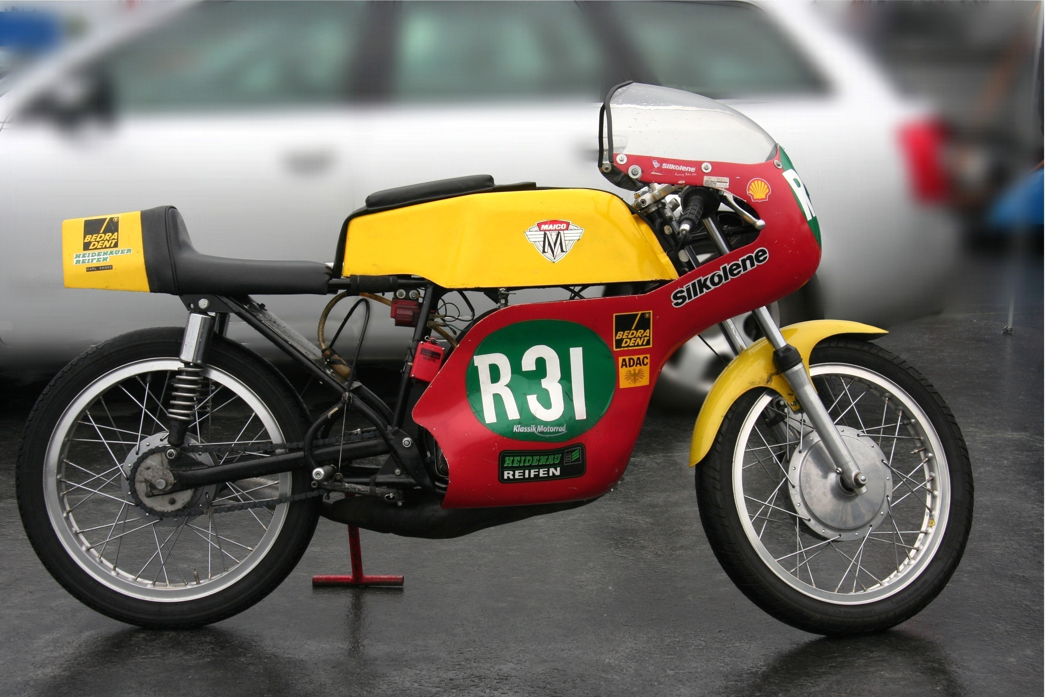 Maico 125 RS 2, Baujahr 1970, Production Racer, im Fahrerlager des Nürburgrings